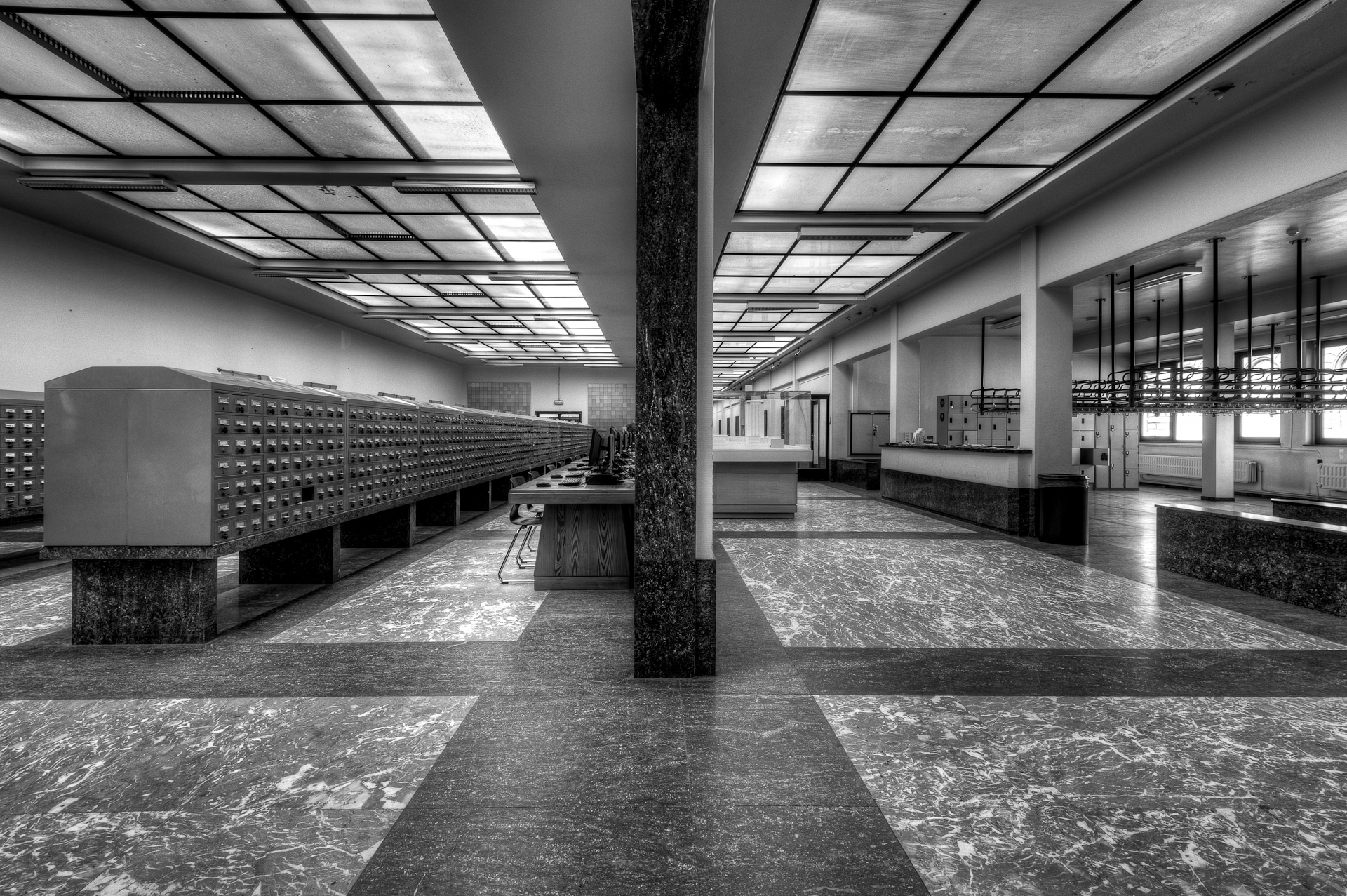 Boekentoren UGent - Cataloguszaal (fichebakken) en centrale gang, gelijkvloers (2012).